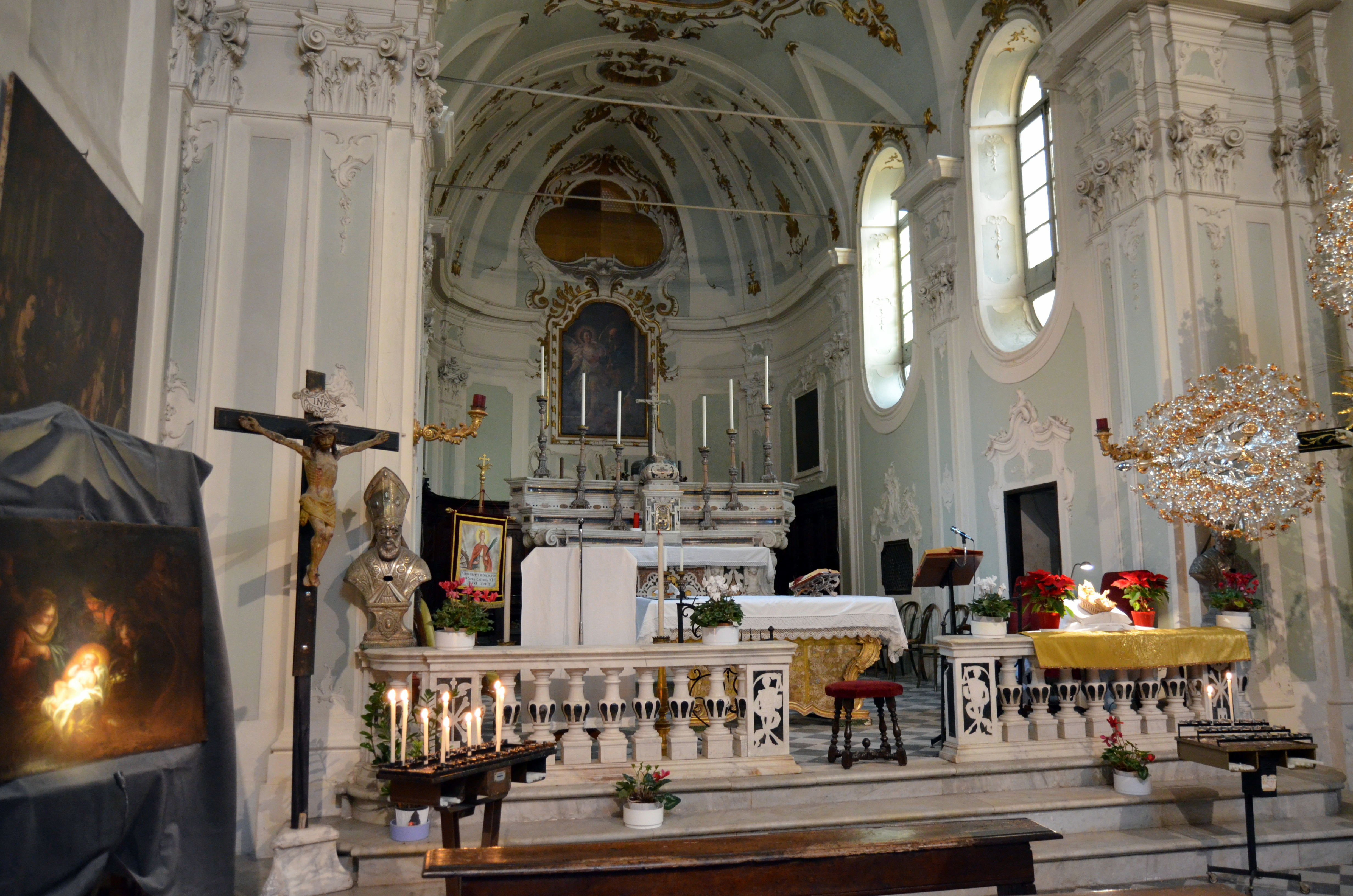 La chiesa di San Pietro in Vincoli, Sestri Levante, Liguria, Italia